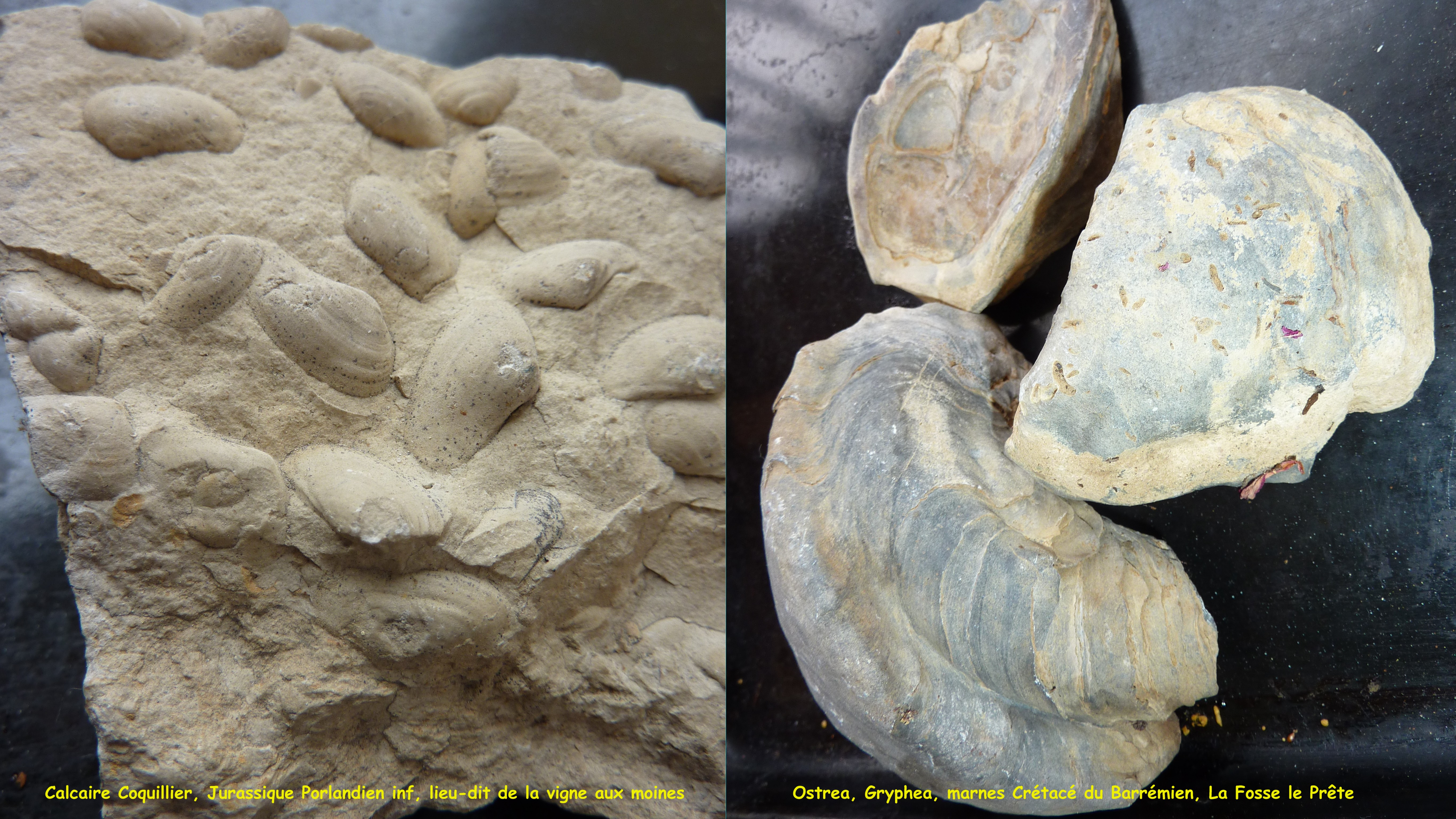 Échantillons paléontologiques Eurville-Bienville. Calcaire coquillier Jurassique. Gryphea Ostrea Crétacé